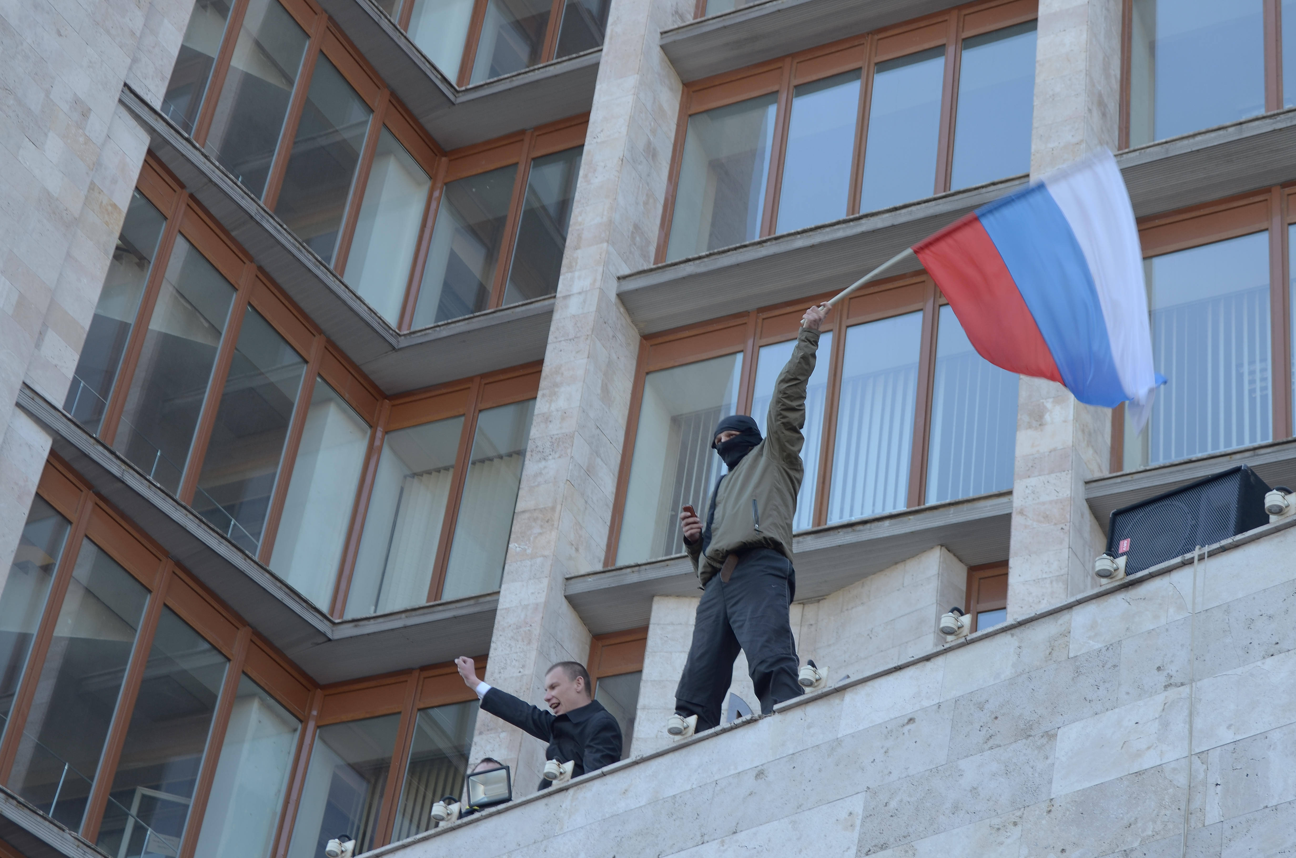 Протесты в Донецке